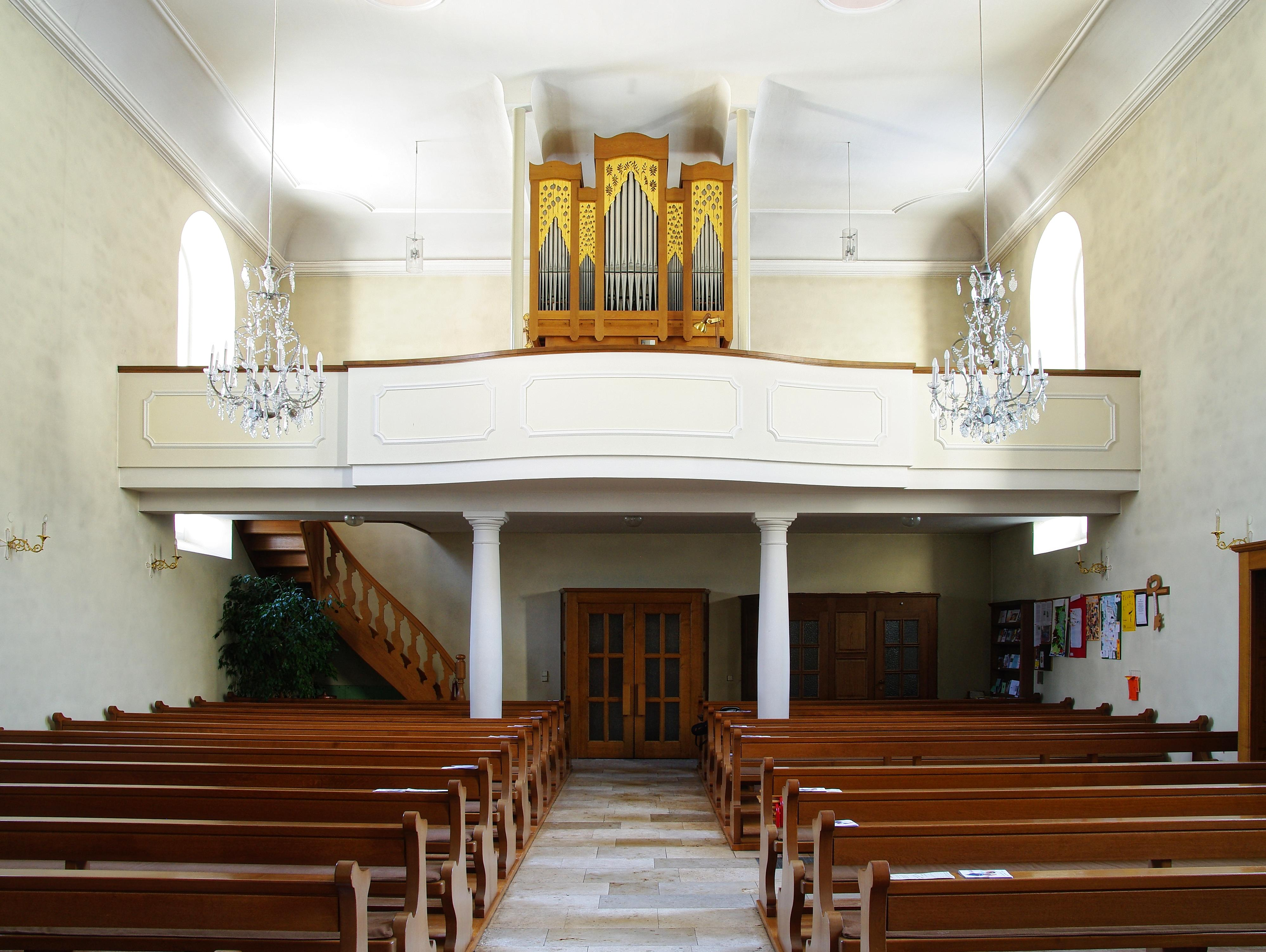 St._Peter_und_Paul (Kappel)